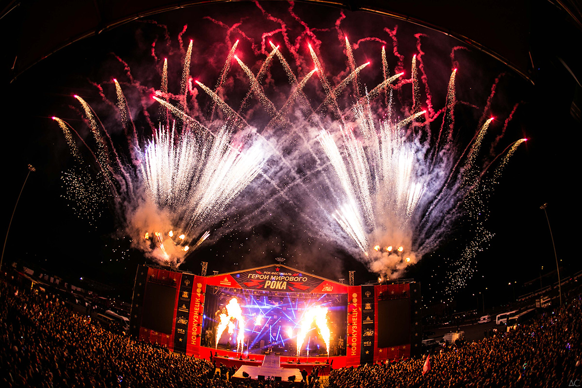 Файер-шоу на международном рок-фестивале "Герои мирового рока" состоявшемся в рамках празднования 400-летия Новокузнецка.